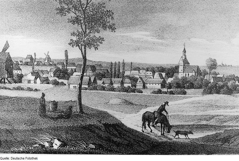 Original image description from the Deutsche Fotothek Wermsdorf-Calbitz. Ortsansicht mit Windmühlen